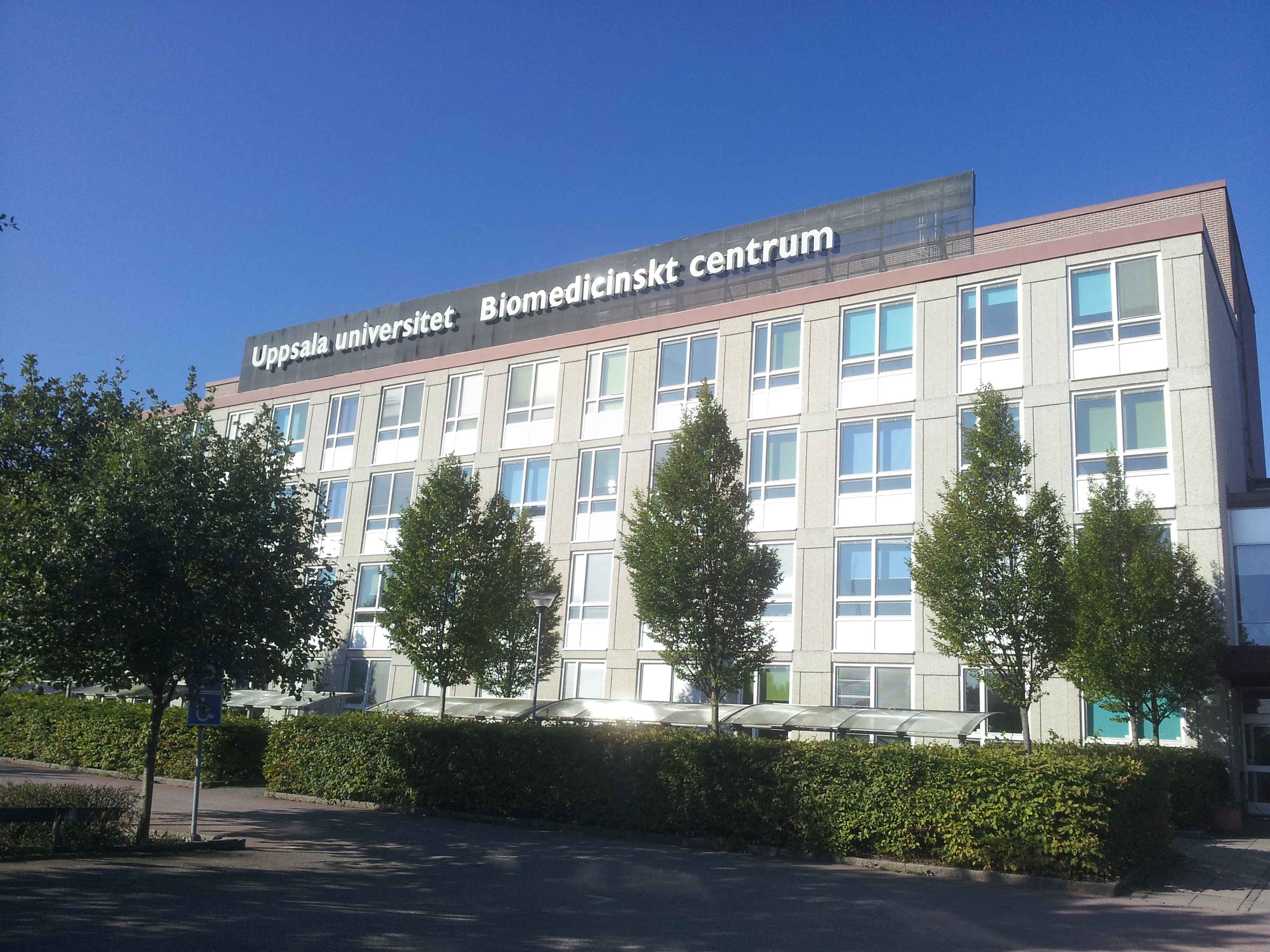 Bild av Biomedicinskt centrum (BMC) sett framifrån